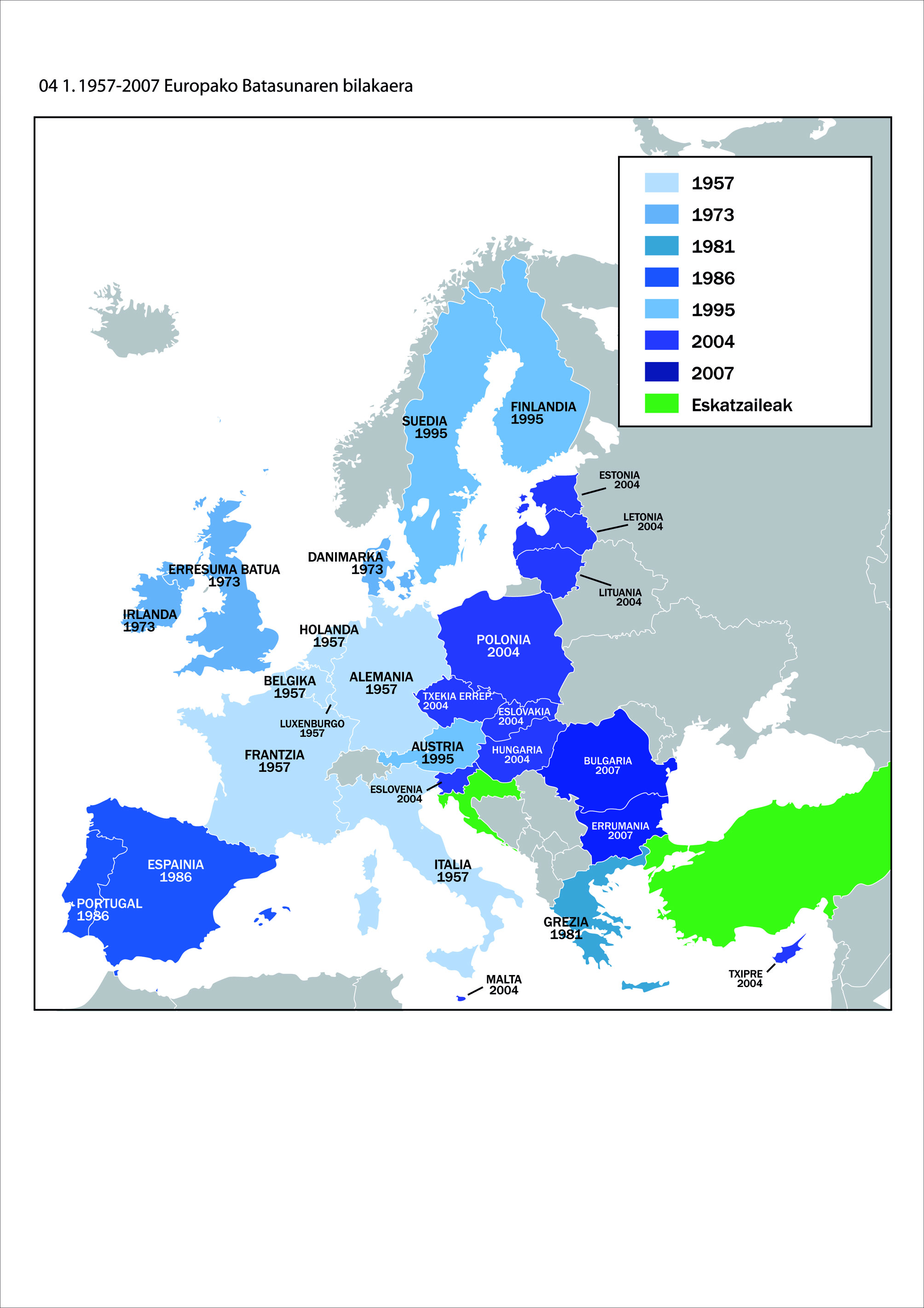 1957-2007 Europar Batasunaren bilakaera, UEUren liburutik hartua.